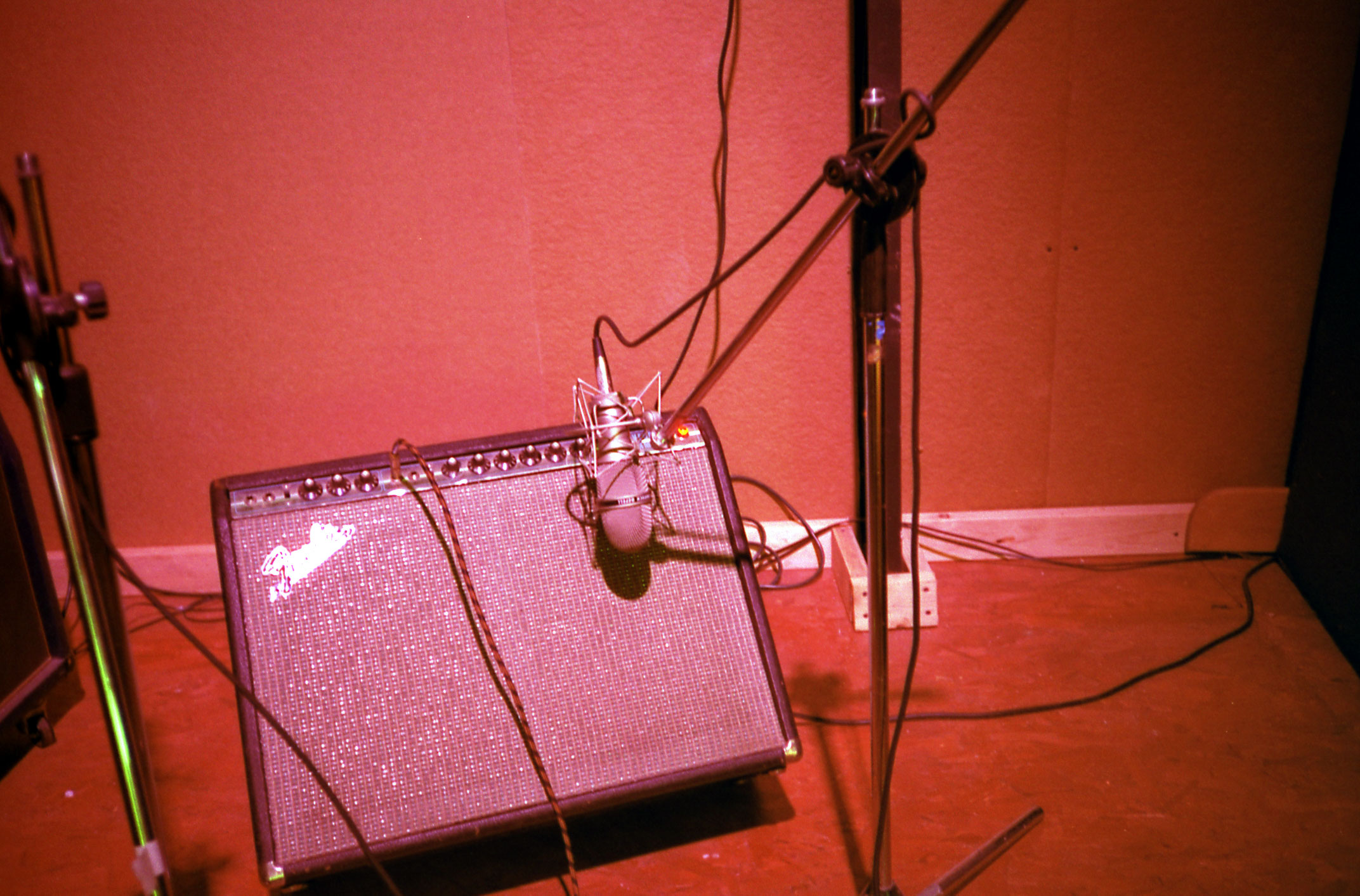 Guitar-Amp